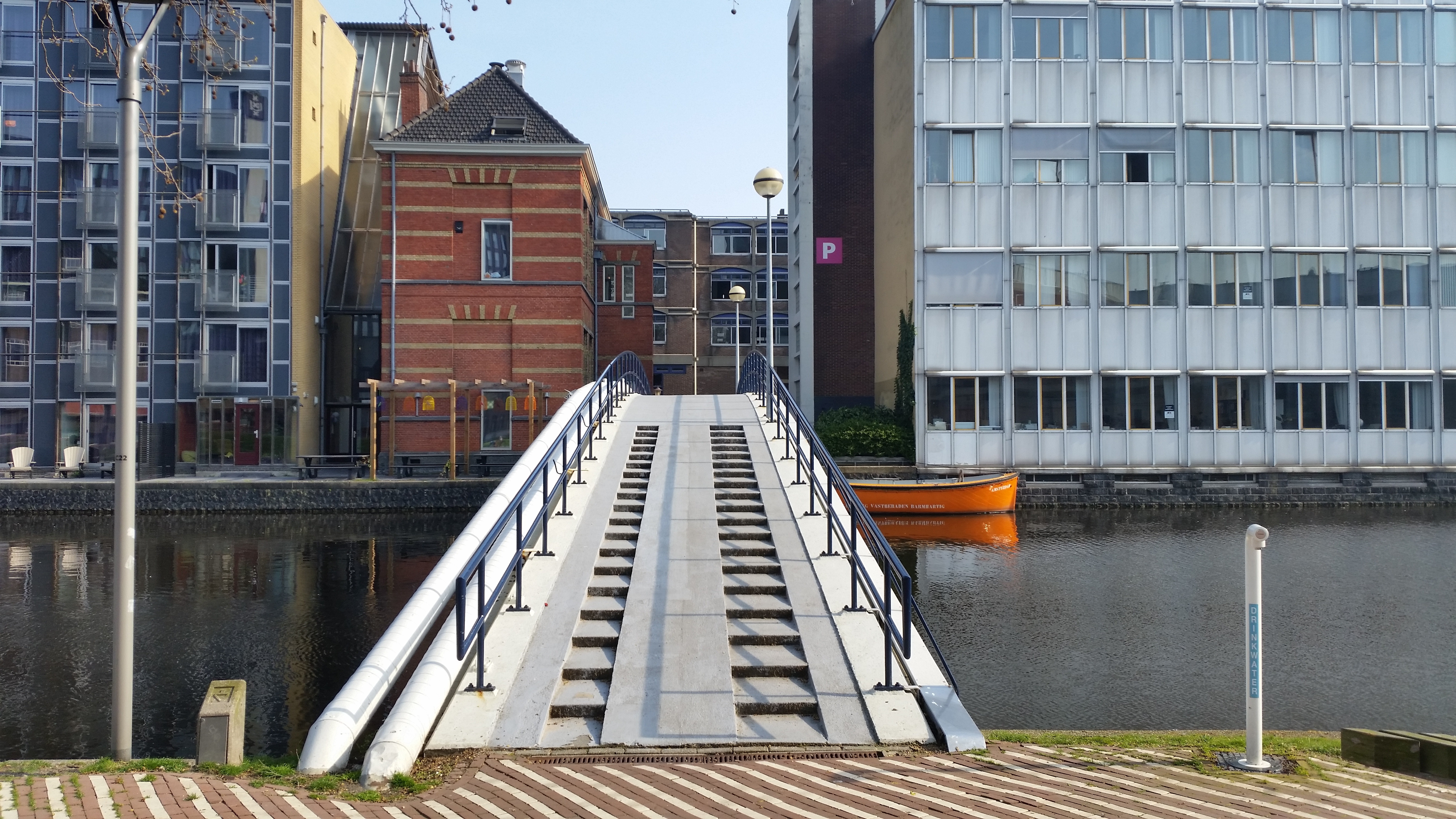 Overzichtsfoto van Brug 116P, Rita Vuykbrug